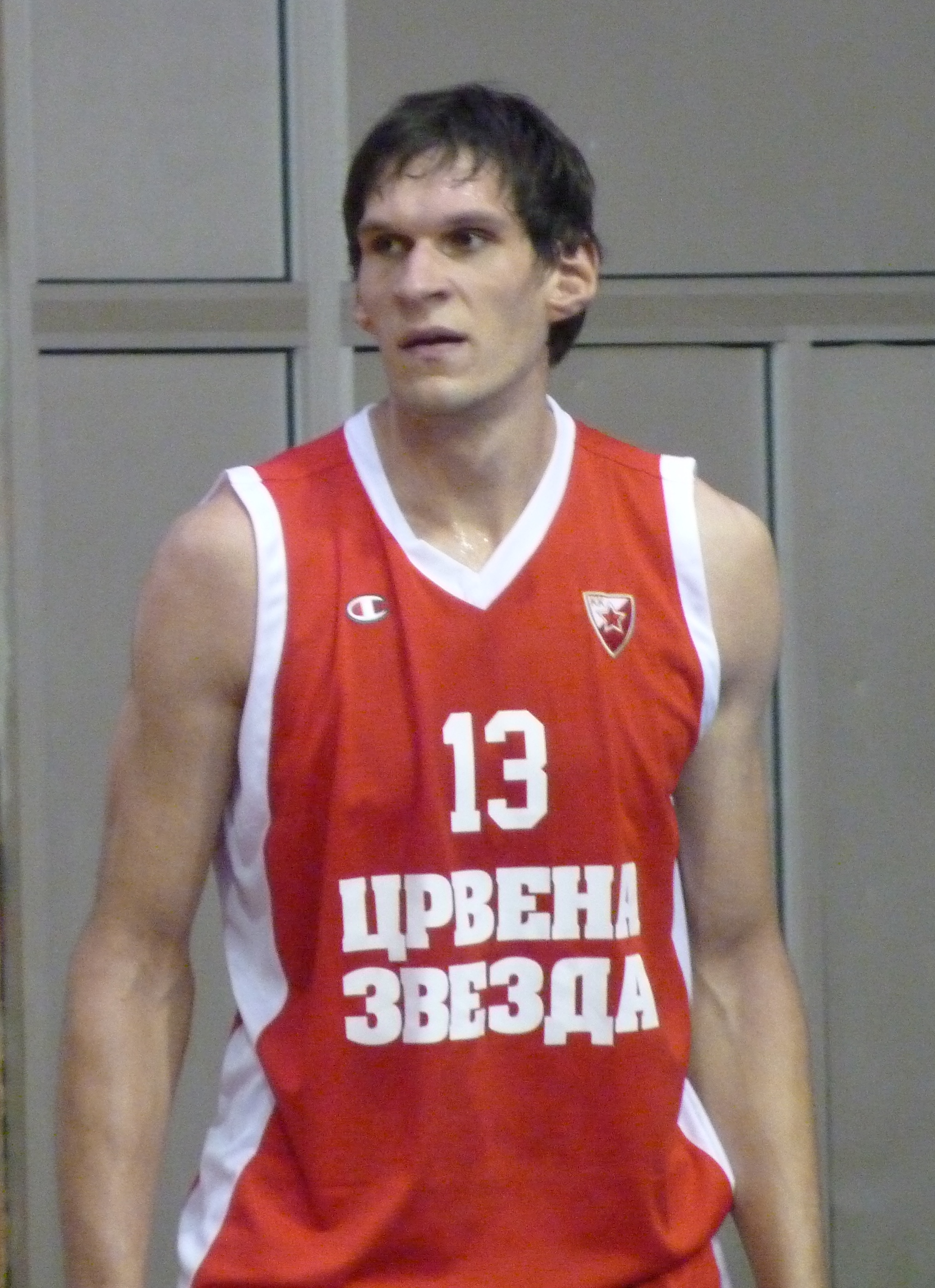 Bobi Marijanovic